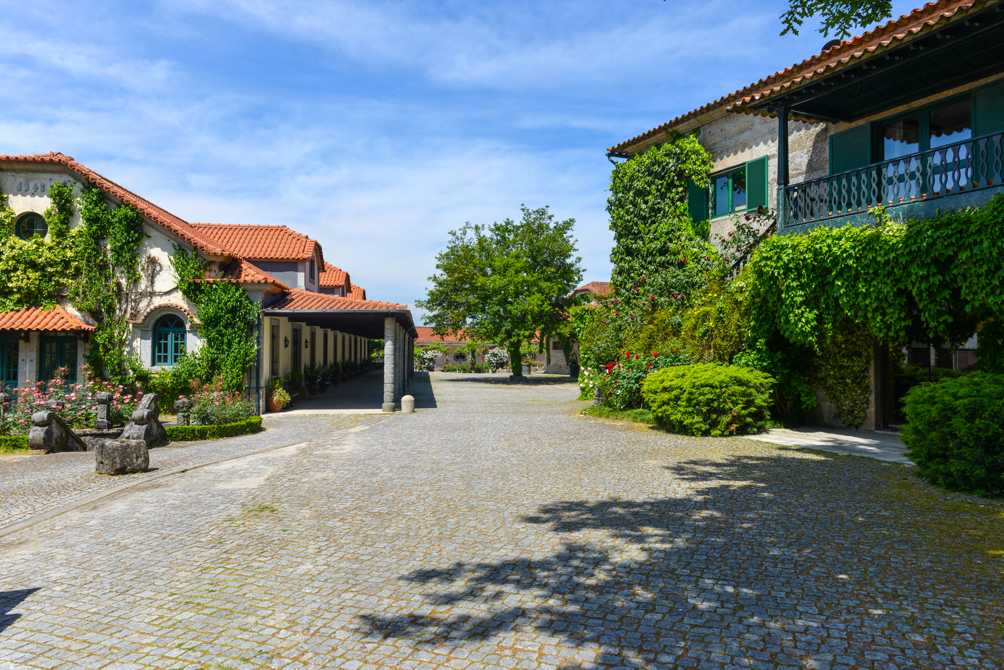 Quinta da Avelada, Penafiel, Region de Porto, Portugal